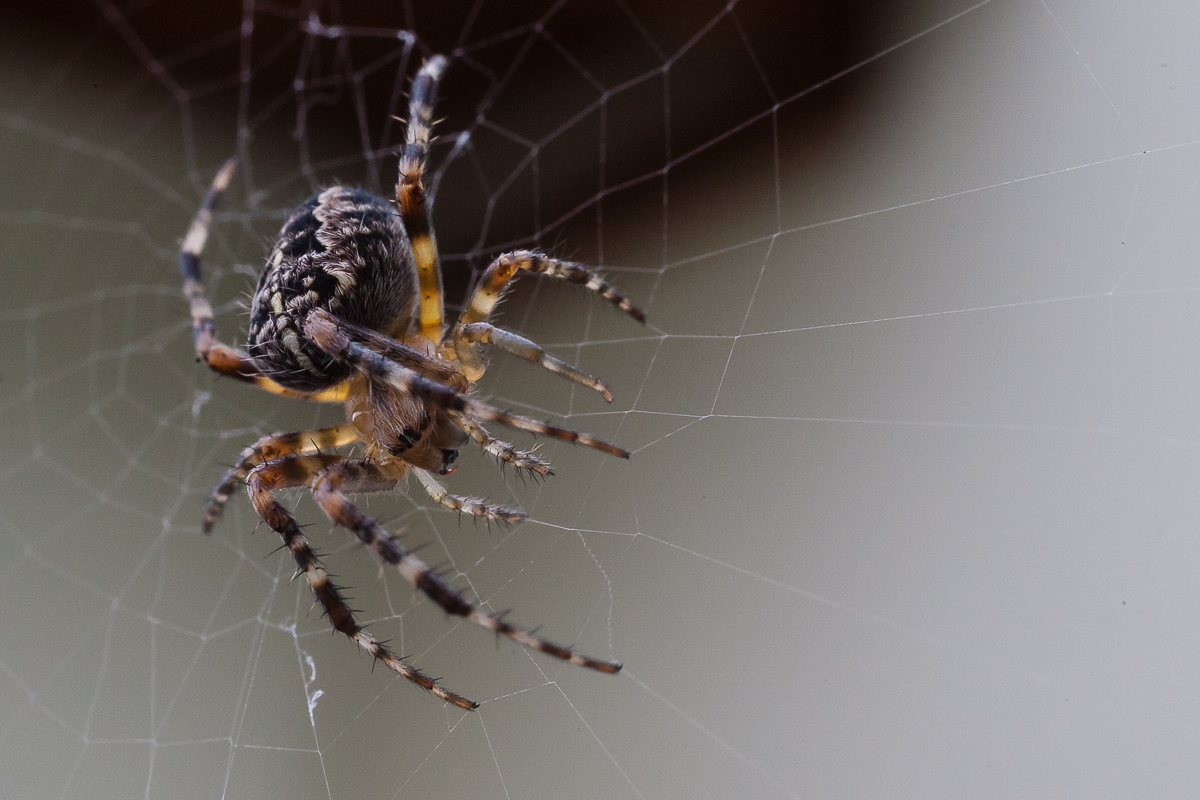 Europäische Gartenkreuzspinne